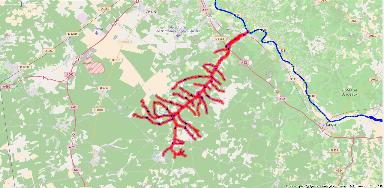 Le Gat-Mort et ses affluents This map may be incomplete, and may contain errors. Don't rely solely on it for navigation.